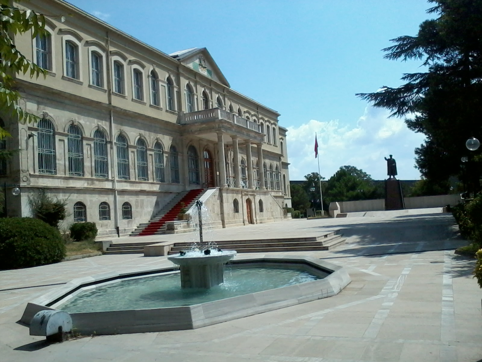 İstanbul Askeri Müzesi.